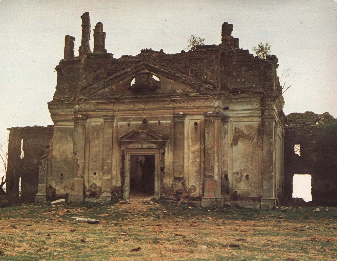 Palazzo Baronale of Monterano